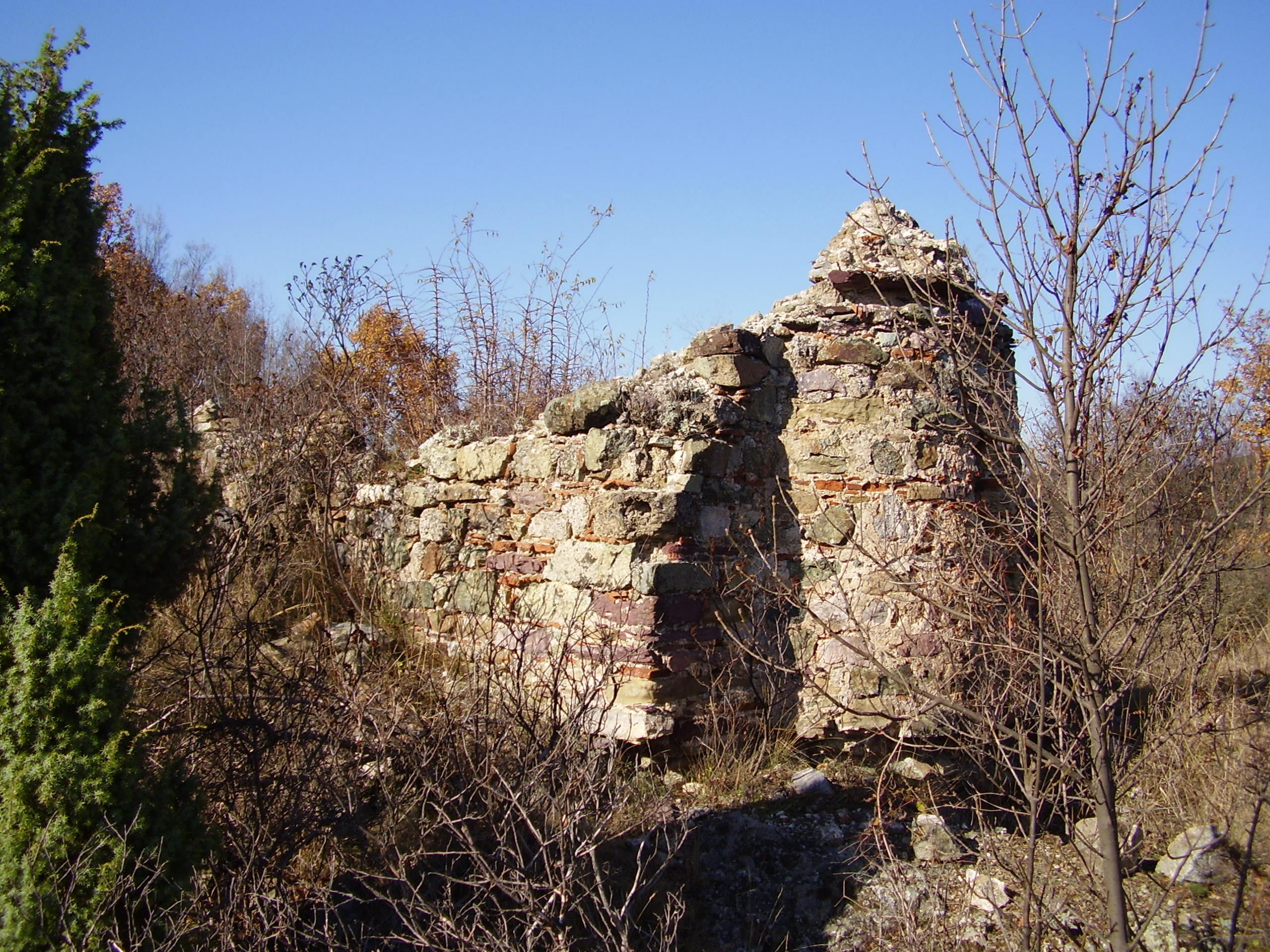 Късносредновековна църква "Света Богородица" - с.Пастух, Кюстендилска област